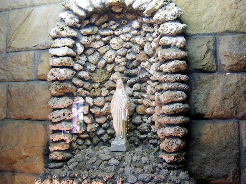 Civitavecchia - Statua della Madonnina delle Lacrime nella Chiesa Parrocchiale di S. Agostino